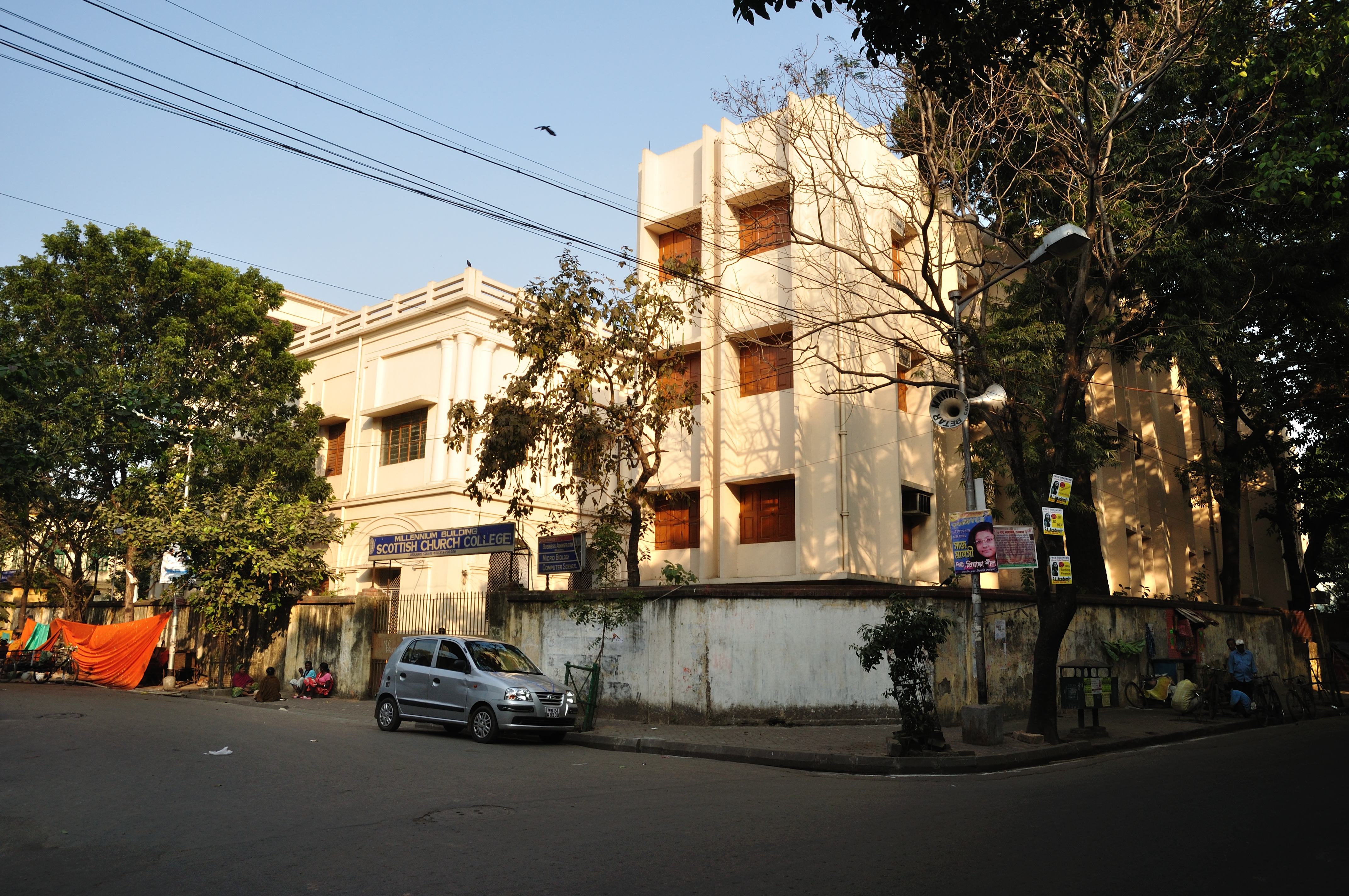 Photographed at Kolkata.